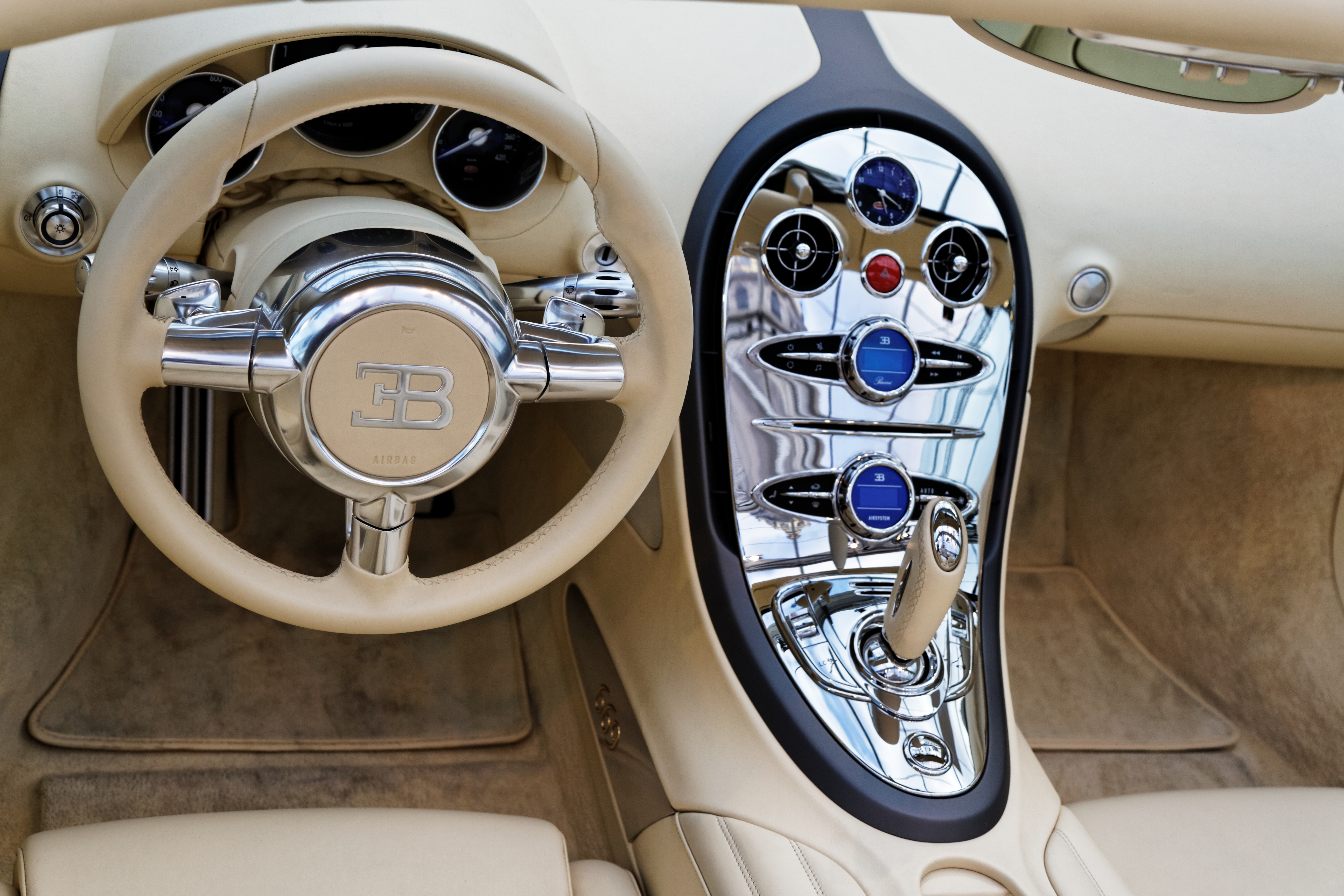 Une Bugatti Veyron 16.4 Grand Sport de 2010.